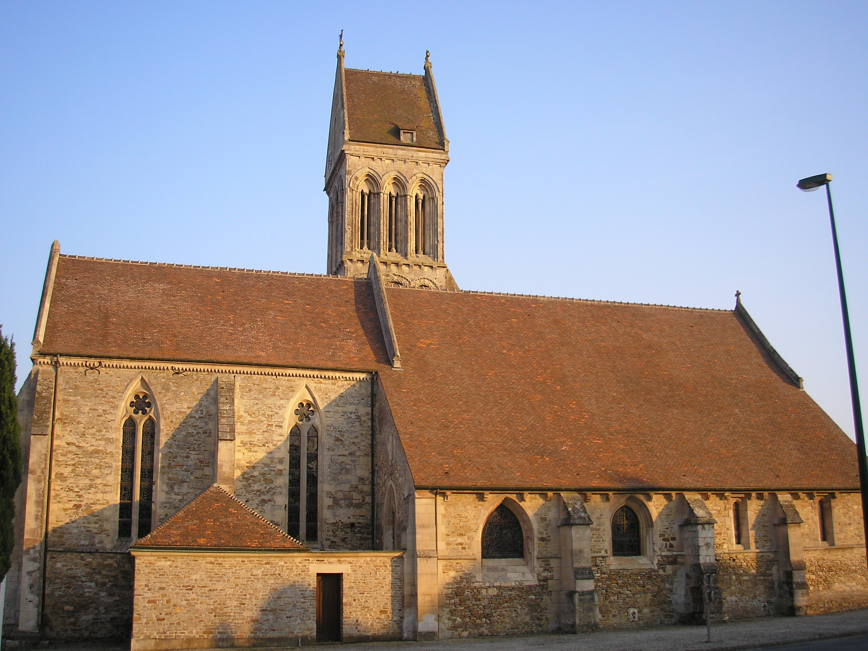 Soumont-Saint-Quentin (Normandie, France). L'église Saint-Quentin.